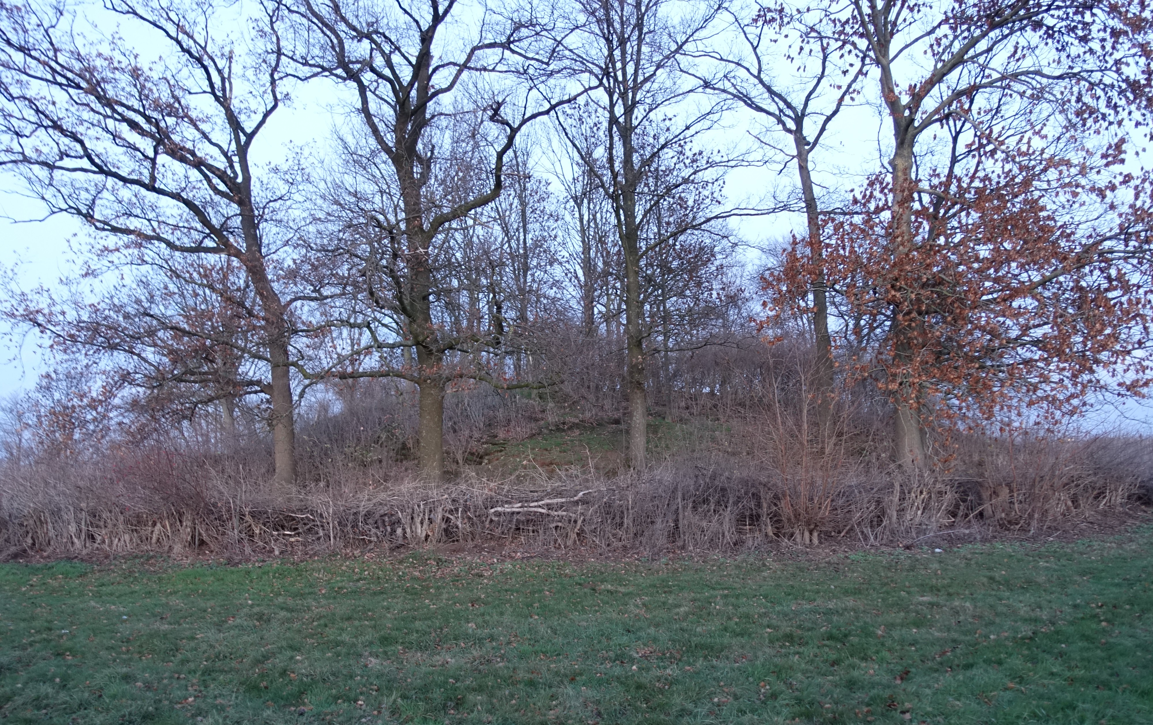 Tumulus in Brustem (Sint-Truiden) België